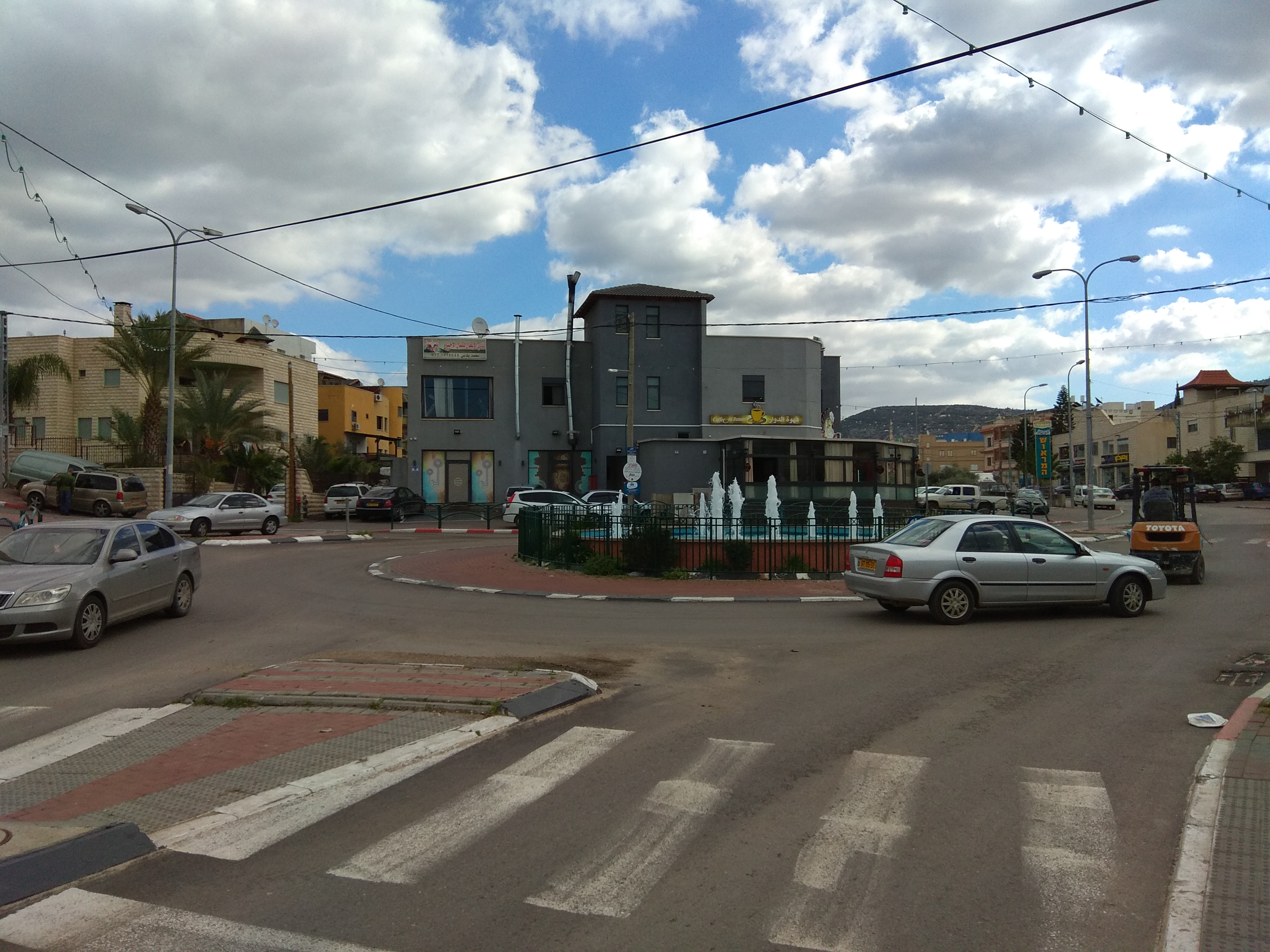 כאבול, 2017